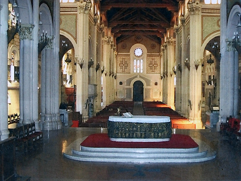 Reggio Calabria: interno del duomo